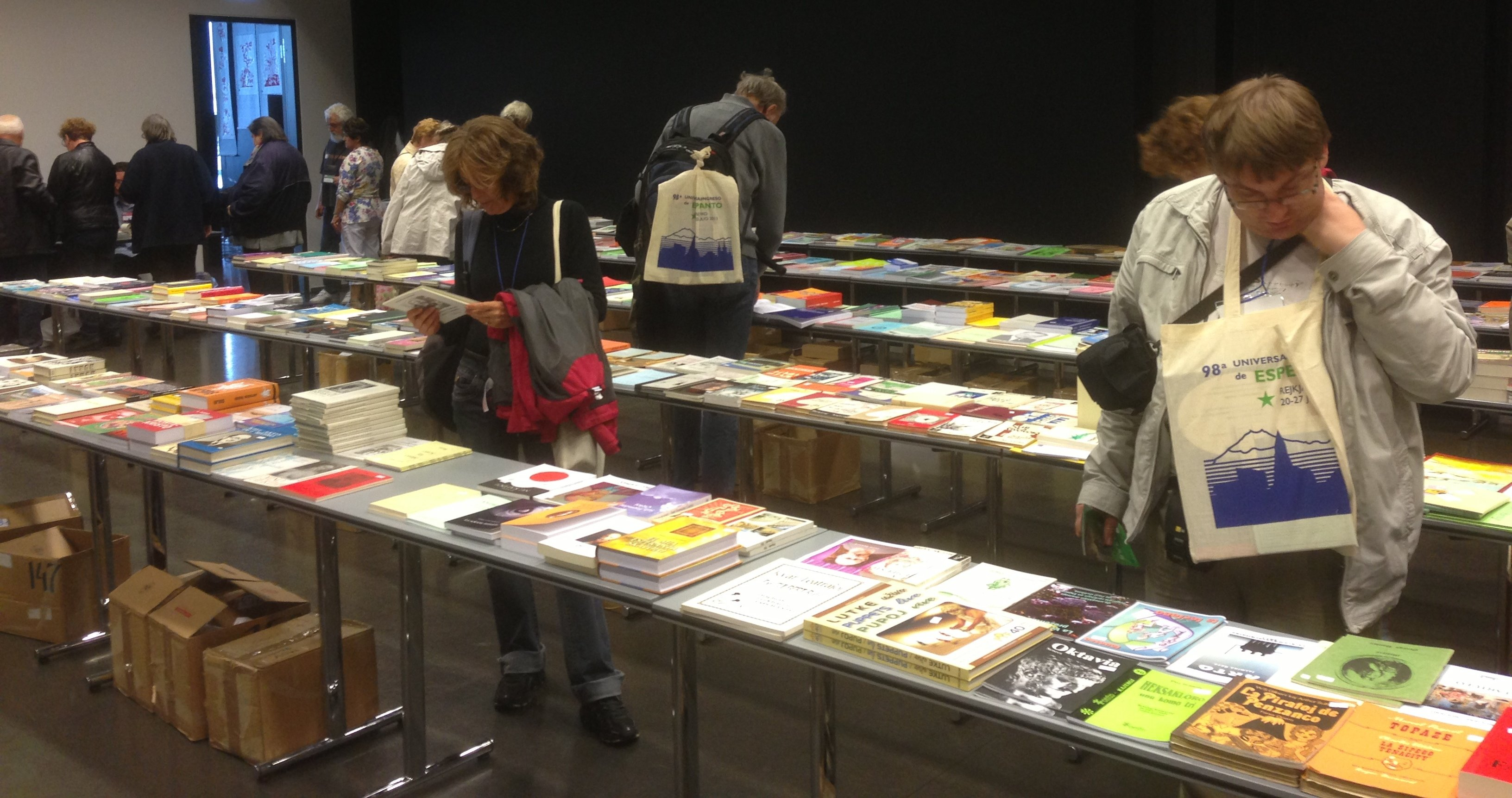 Libroservo en Harpa. Rejkjaviko, Islando.